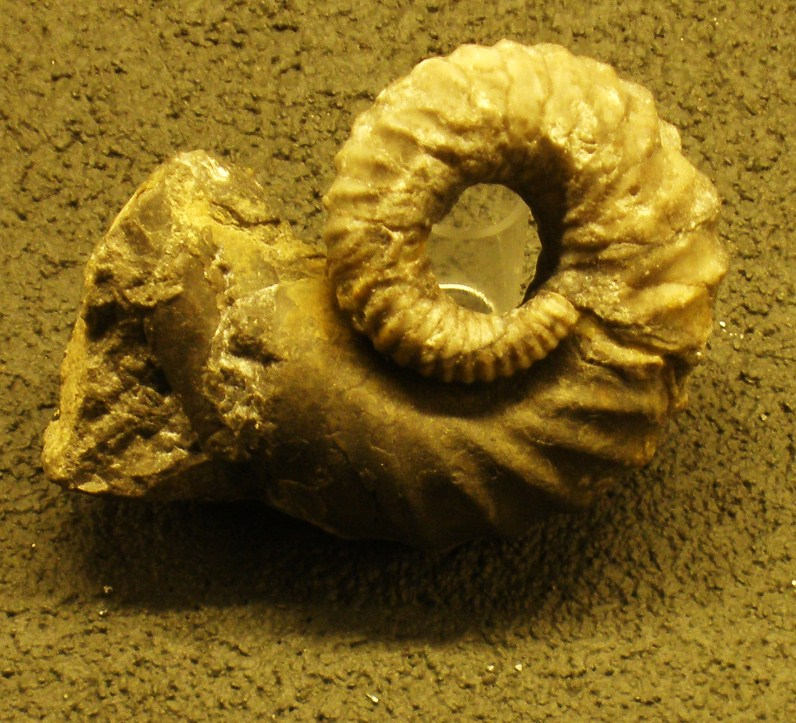 Fossil of Peismoceras, an extinct cephalopod - Took the photo at Teylers Museum, Haarlem